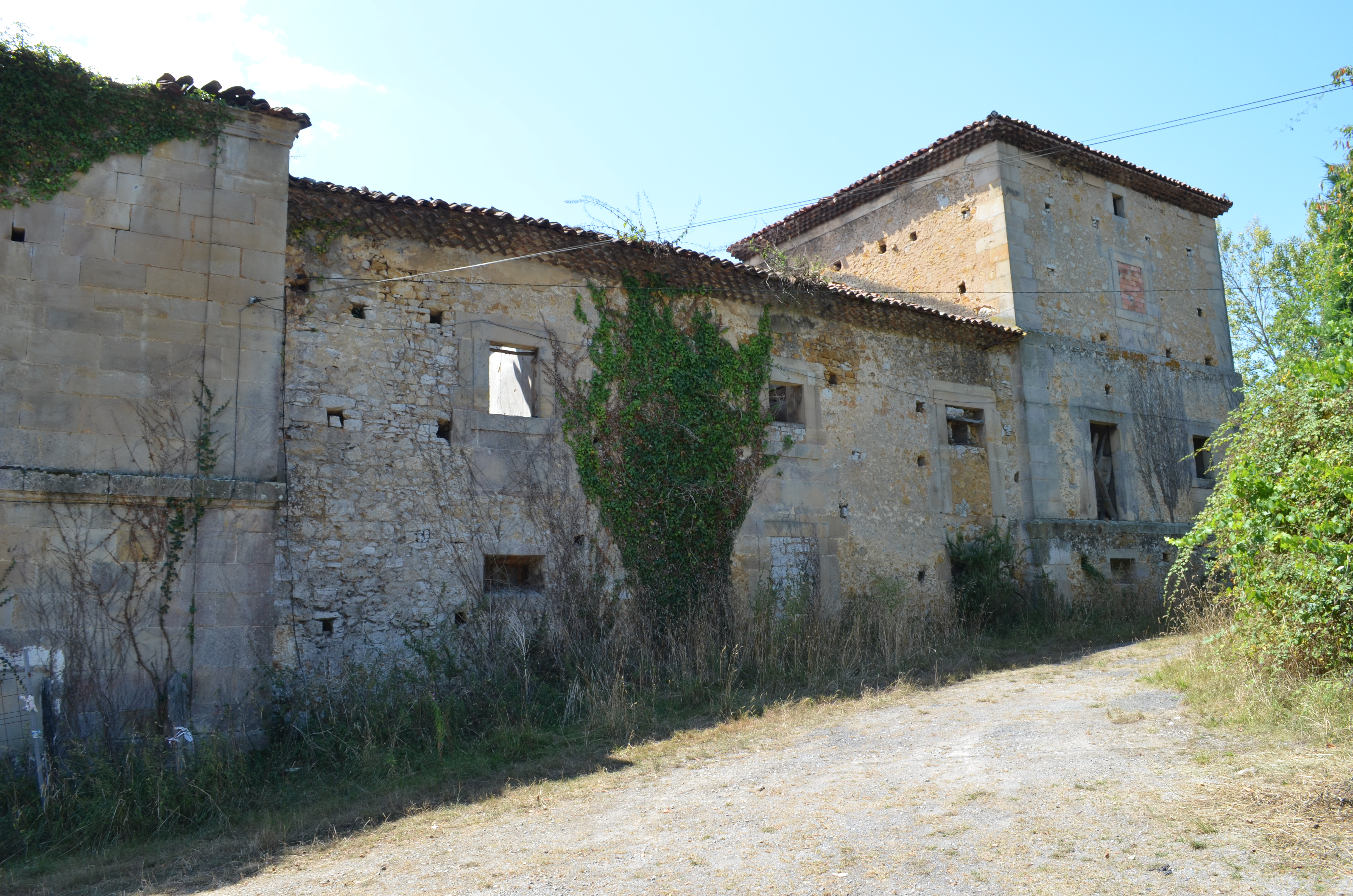 Palacio de Torre de Celles en Siero, Asturias, España